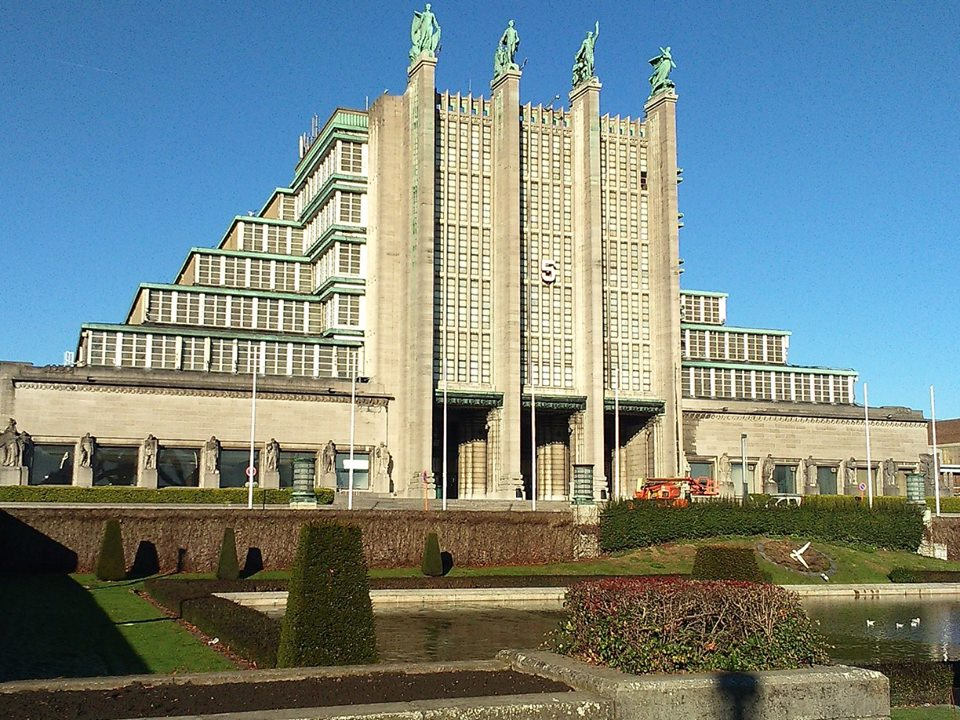 Façade du palais 5 du Parc des expositions du Heysel